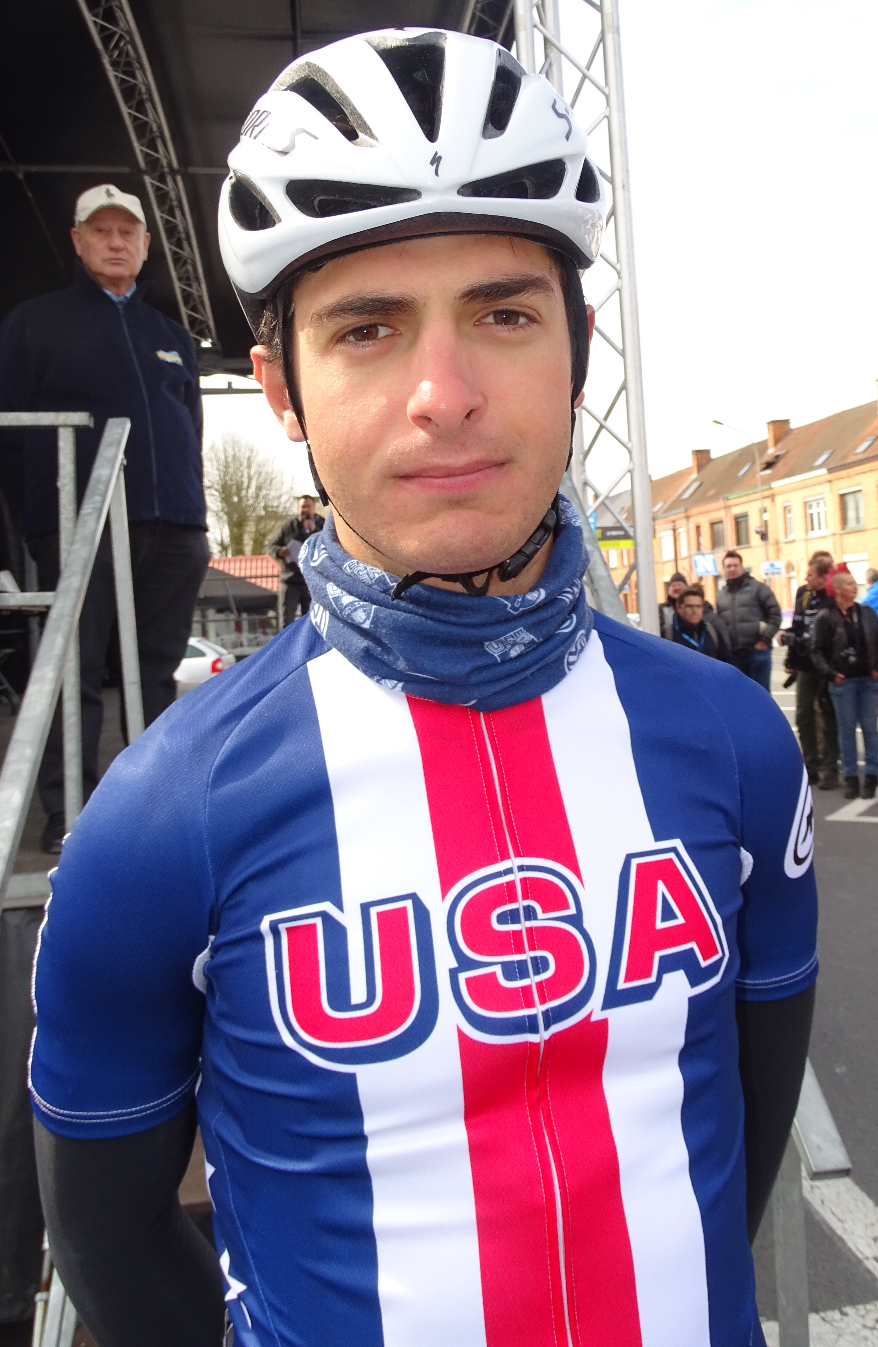 Reportage réalisé le samedi 9 avril à l'occasion du départ et de l'arrivée du Tour des Flandres espoirs 2016 à Audenarde, Belgique.